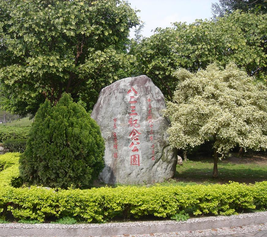 台北縣中和市八二三紀念公園巨石碑